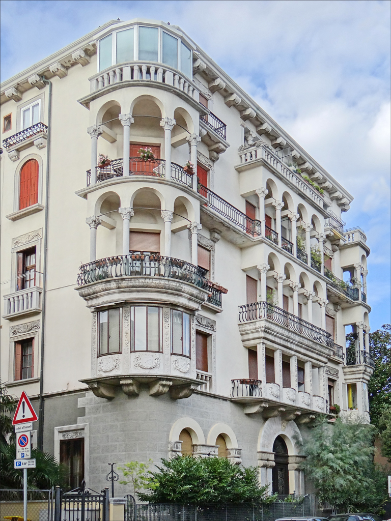 La maison Licia est située sur la via Negroponte Elle a été conçue dans les années 1920 (?) par l'architecte Attilio Perez dans le style Liberty ___________